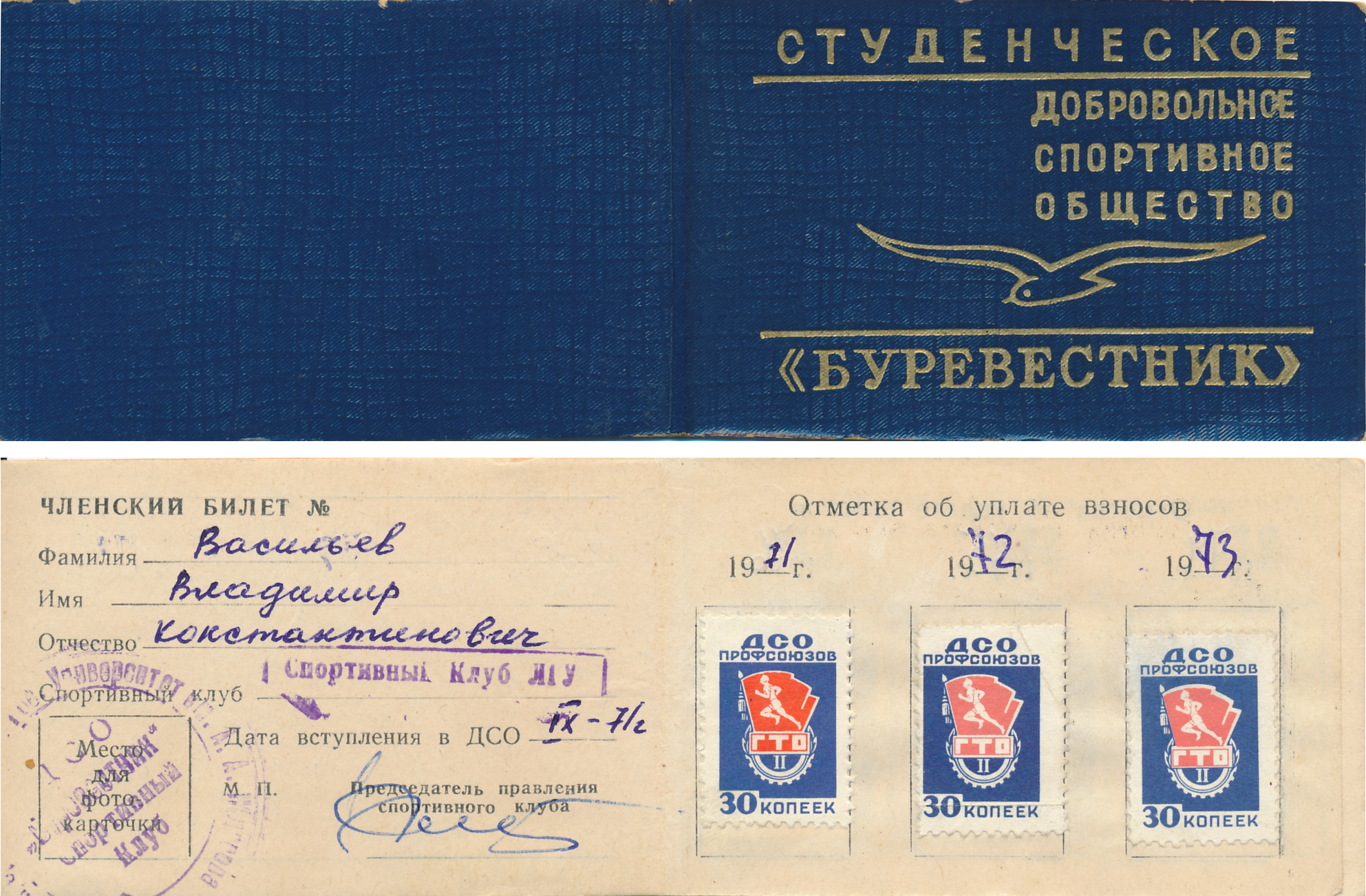 Членский билет общества "Буревестник", 1971 год.